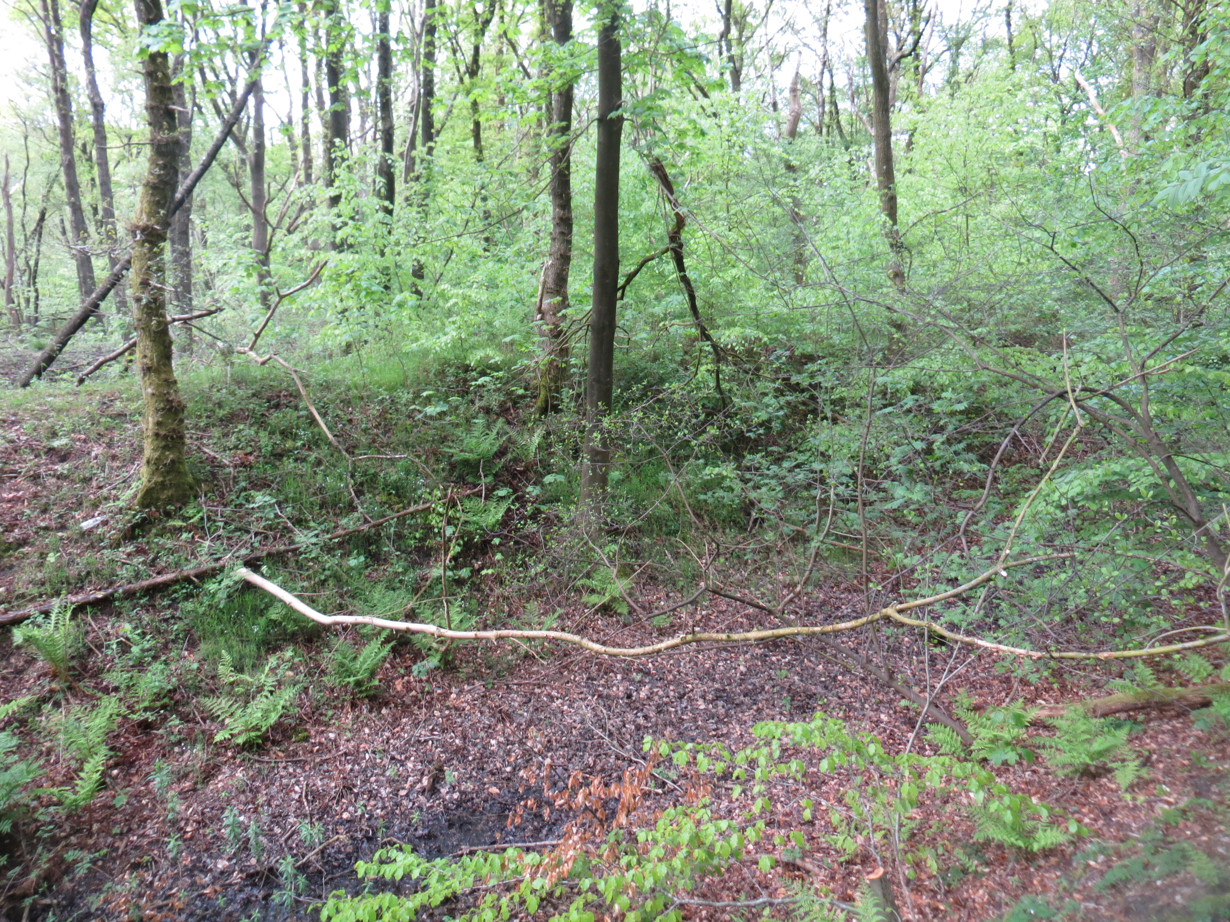 Schießstandwall (Flensburg-Mürwik 2016), Bild 06